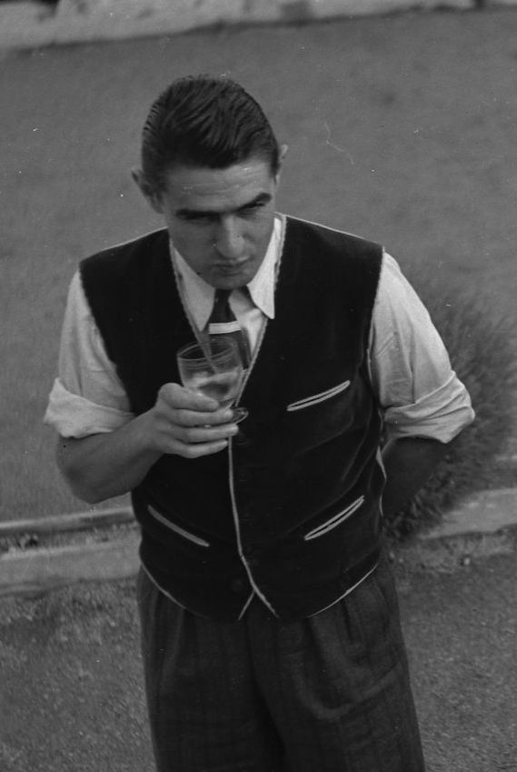 Boulodrome à Toulouse. 13-14 Juillet 1949. Vue de quatre hommes verre à la main ; de gauche à droite : les cyclistes René Vieto, Apo Lazarides et Lucien Tesseire lors d'une partie de pétanque.